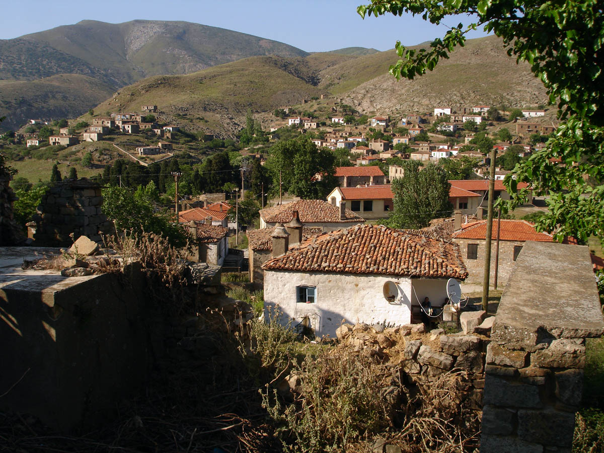 Το χωριό Σχοινούδι (Dereköy). Η φωτογραφία ανήκει σε εμένα και βρίσκεται στο άρθρο του blog μου